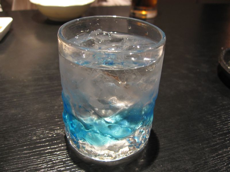 awamori